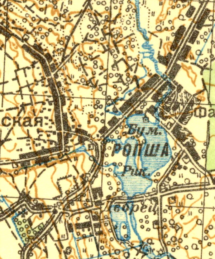 Топографическая карта Ленинградской области, квадрат О-35-12-Г (Ропша), село Ропша